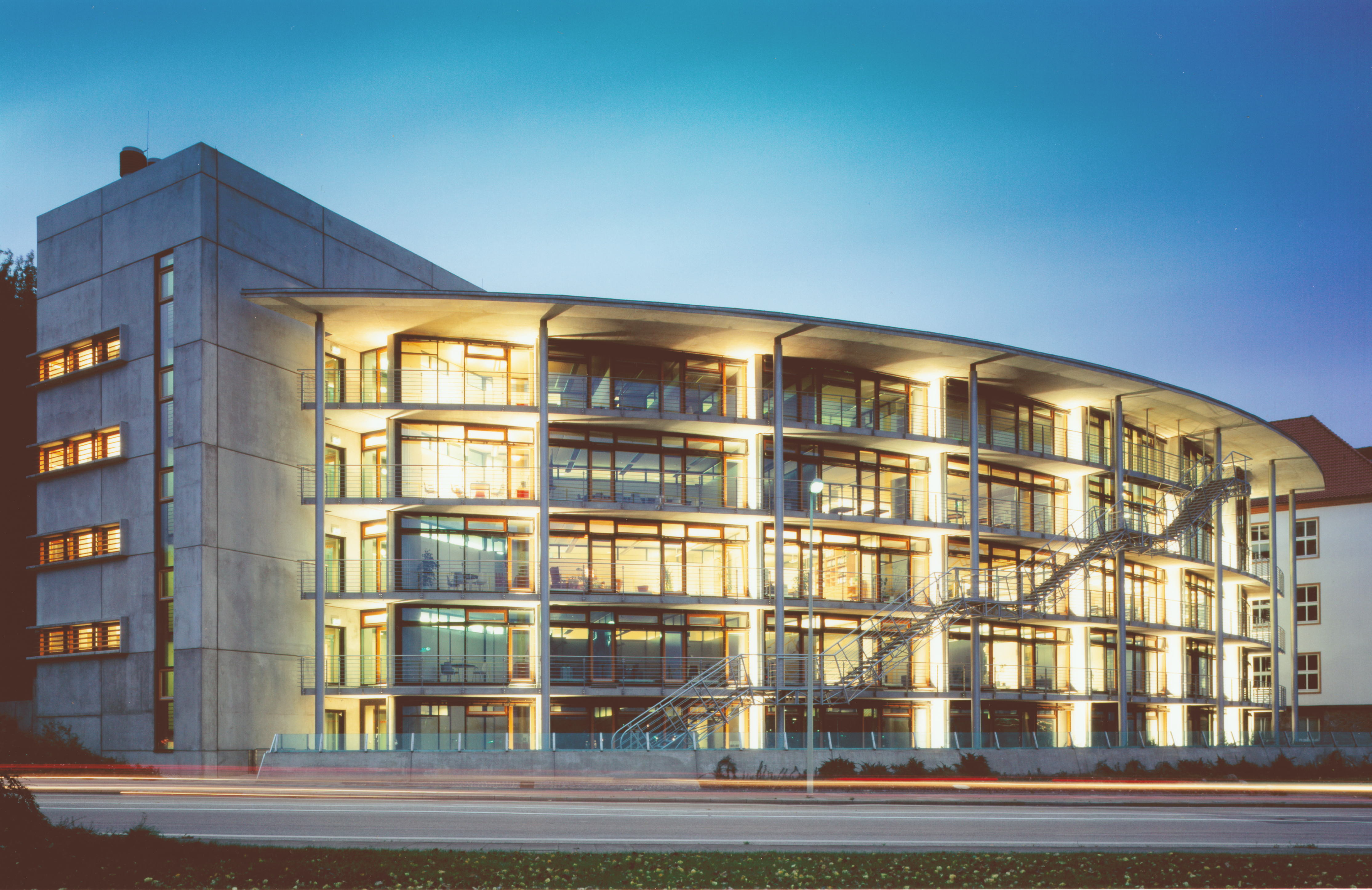 Zentralbibliothek Wirtschaft Kiel, Architekt: Dipl. Ing. Walter von Lom